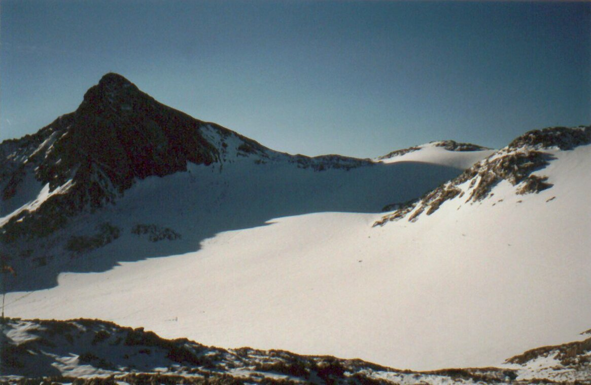 Bildbeschreibung: Blick auf den Schesaplana Gipfel über Brandner Gletscher von Mannheimer Hütte aus gesehen. Quelle: Selbst fotografiert Fotograf: Tolderi Datum: Sommer 2000 Sonstiges: hab leider kein besseres Bild, da analog Fotografiert